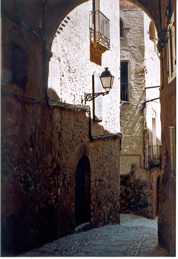 Torroja